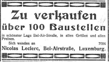 Annonce publiée au Luxemburger Wort, N° 249/250 du 6/7 septembre 1913